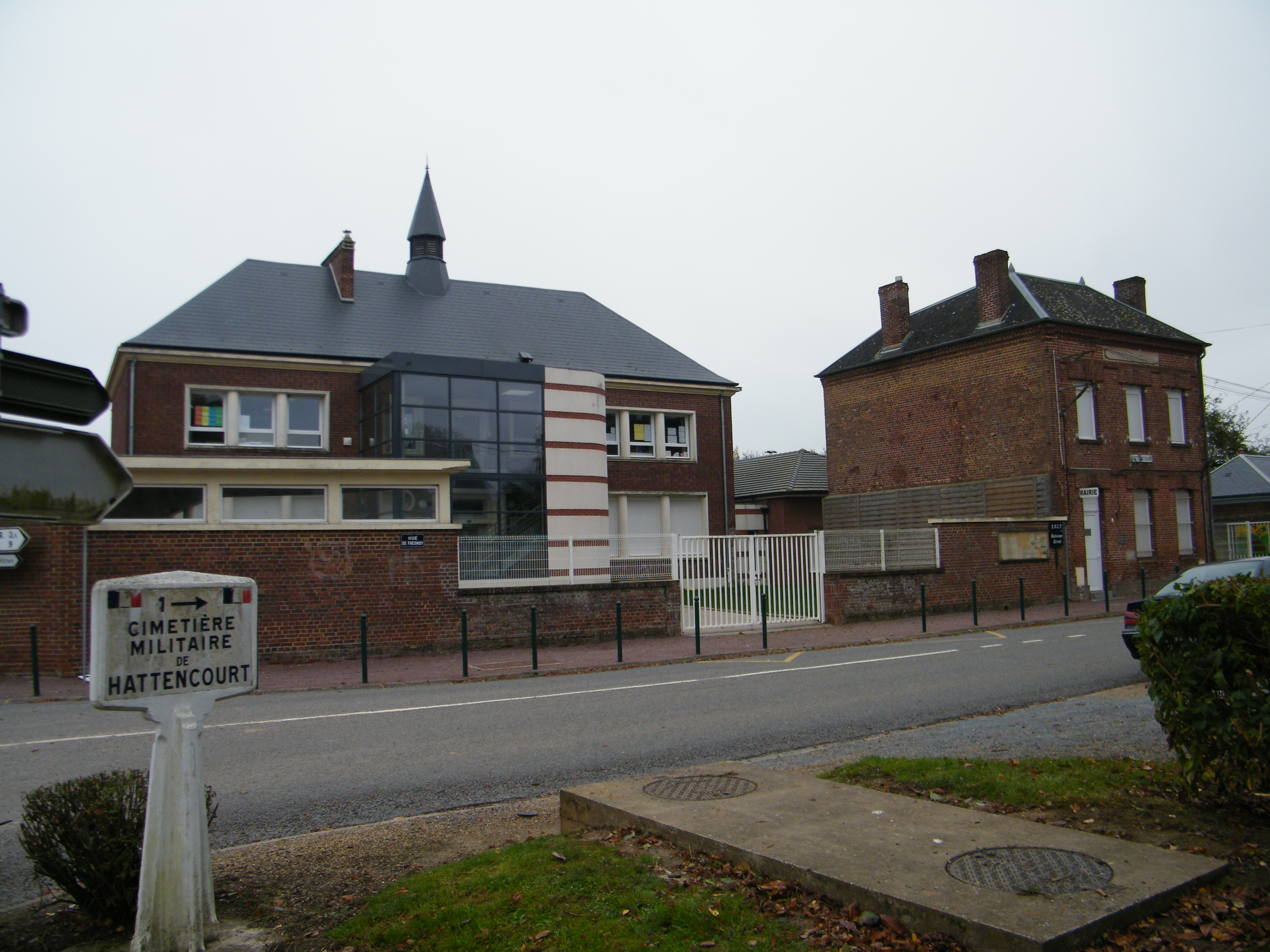 Bâtiments communaux.